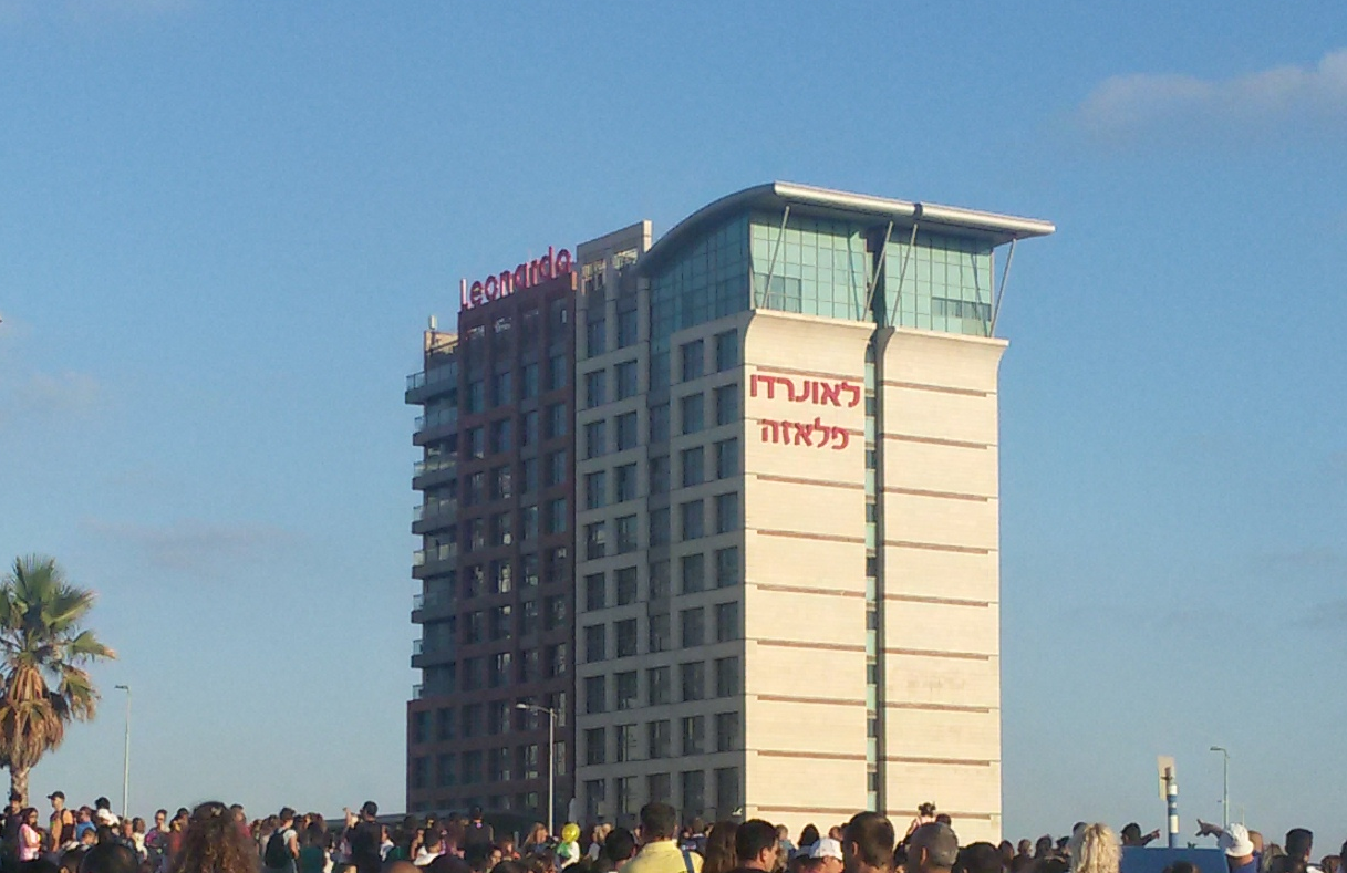 מלון לאונרדו פלאזה בריביירה הדרומית שבאשדוד.